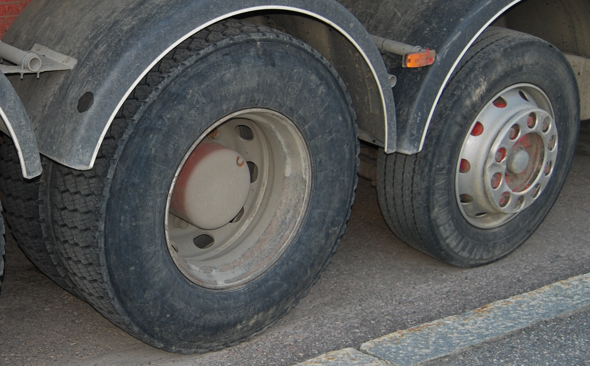 Porovnání dvojmontáže a jednoduché montáže kol u SISU E12 470.